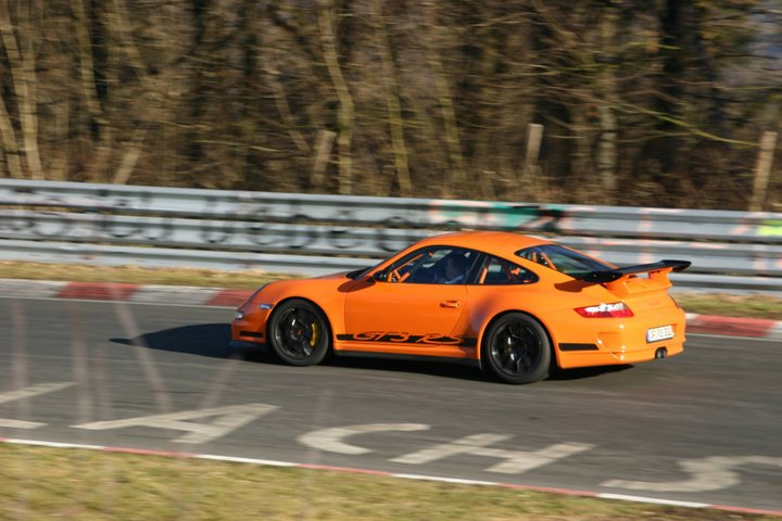 Porsche 997 GT3 RS at Nuerburgring